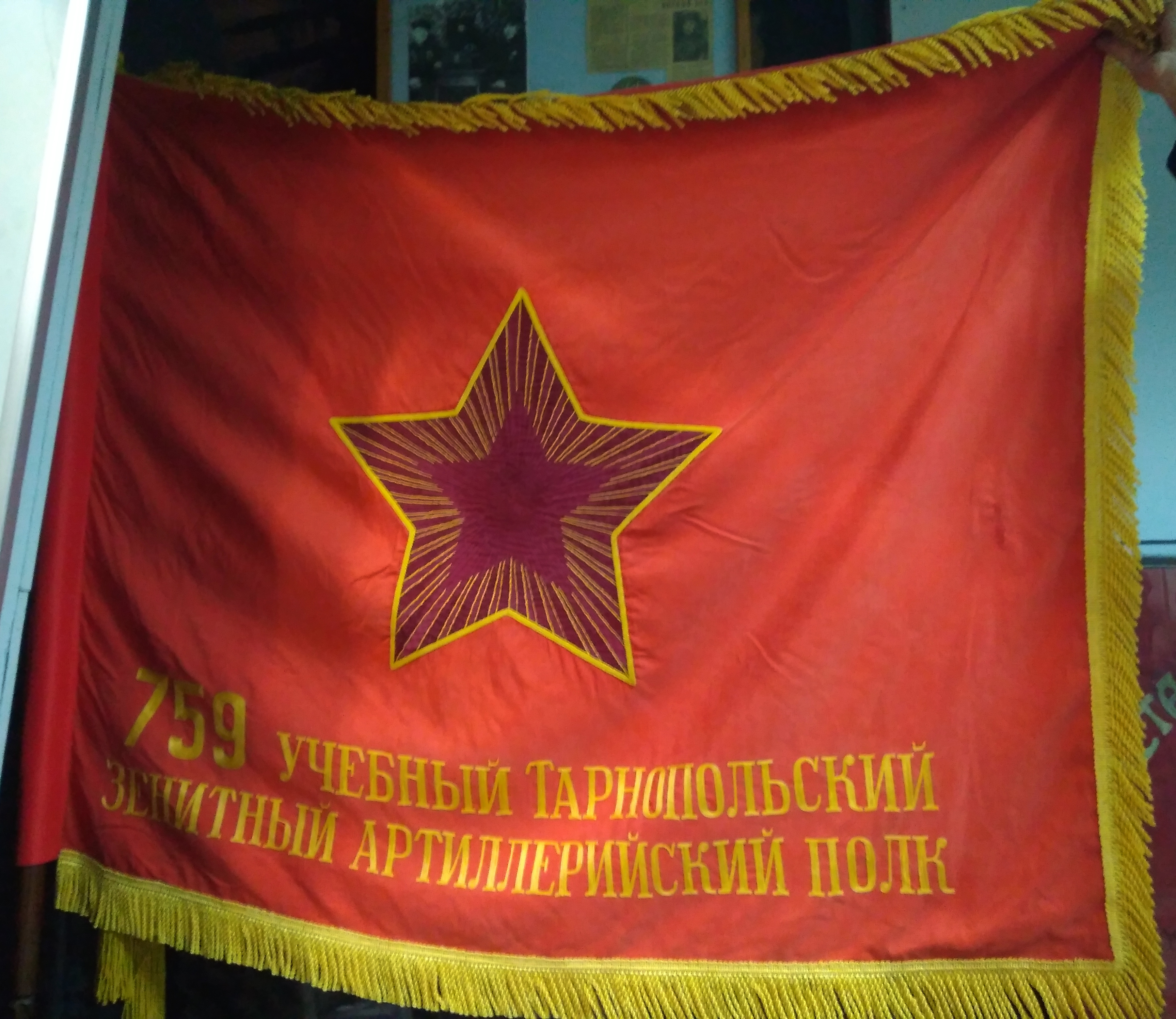 Экспозиция в музее Дома офицеров в Алматы